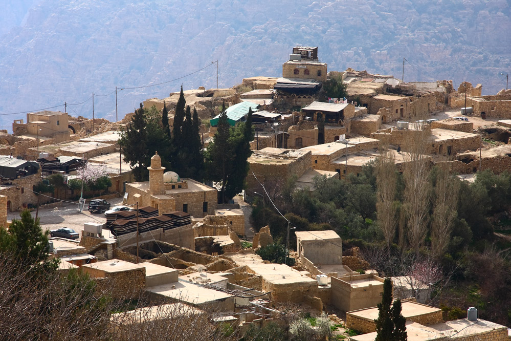 Dana Village